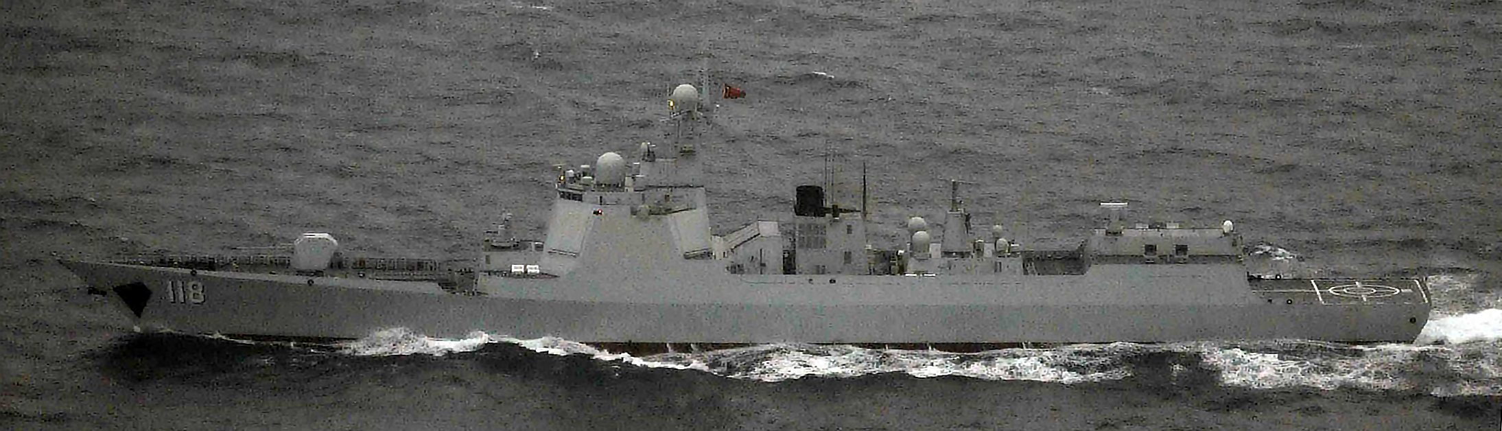 ２月１５日（金）午後７時頃、海上自衛隊第３ミサイル艇隊所属「しらたか」 （佐世保）及び第１３護衛隊所属「さわぎり」（佐世保）が、福江島の北西約 １００ｋｍの海域を北東進するルーヤンⅢ級ミサイル駆逐艦１隻及びジャンカ イⅡ級フリゲート２隻を確認した。その後、これらの艦艇が対馬海峡を北上し、日本海に向けて航行したことを 確認した。